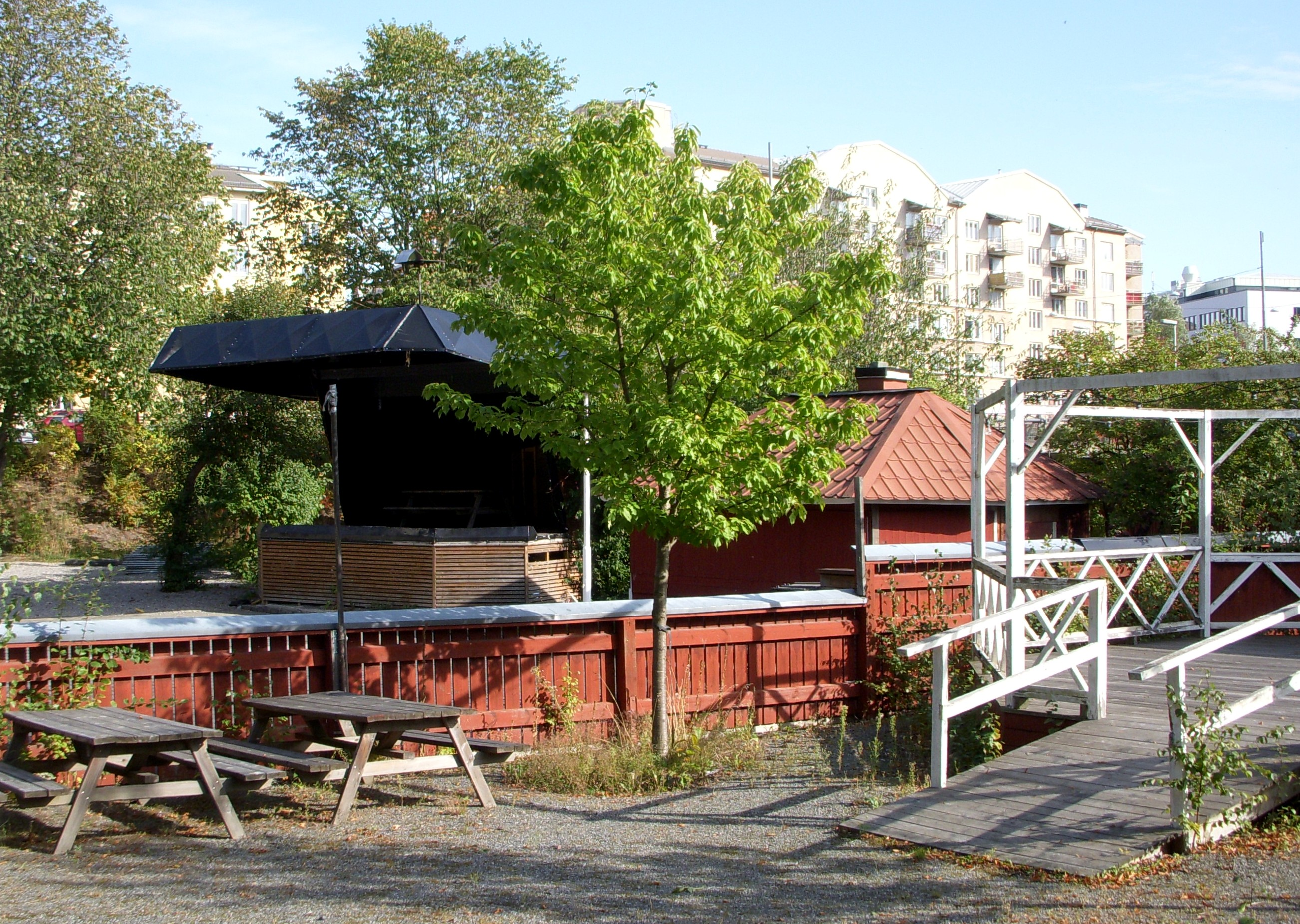 Tantogårdens scen